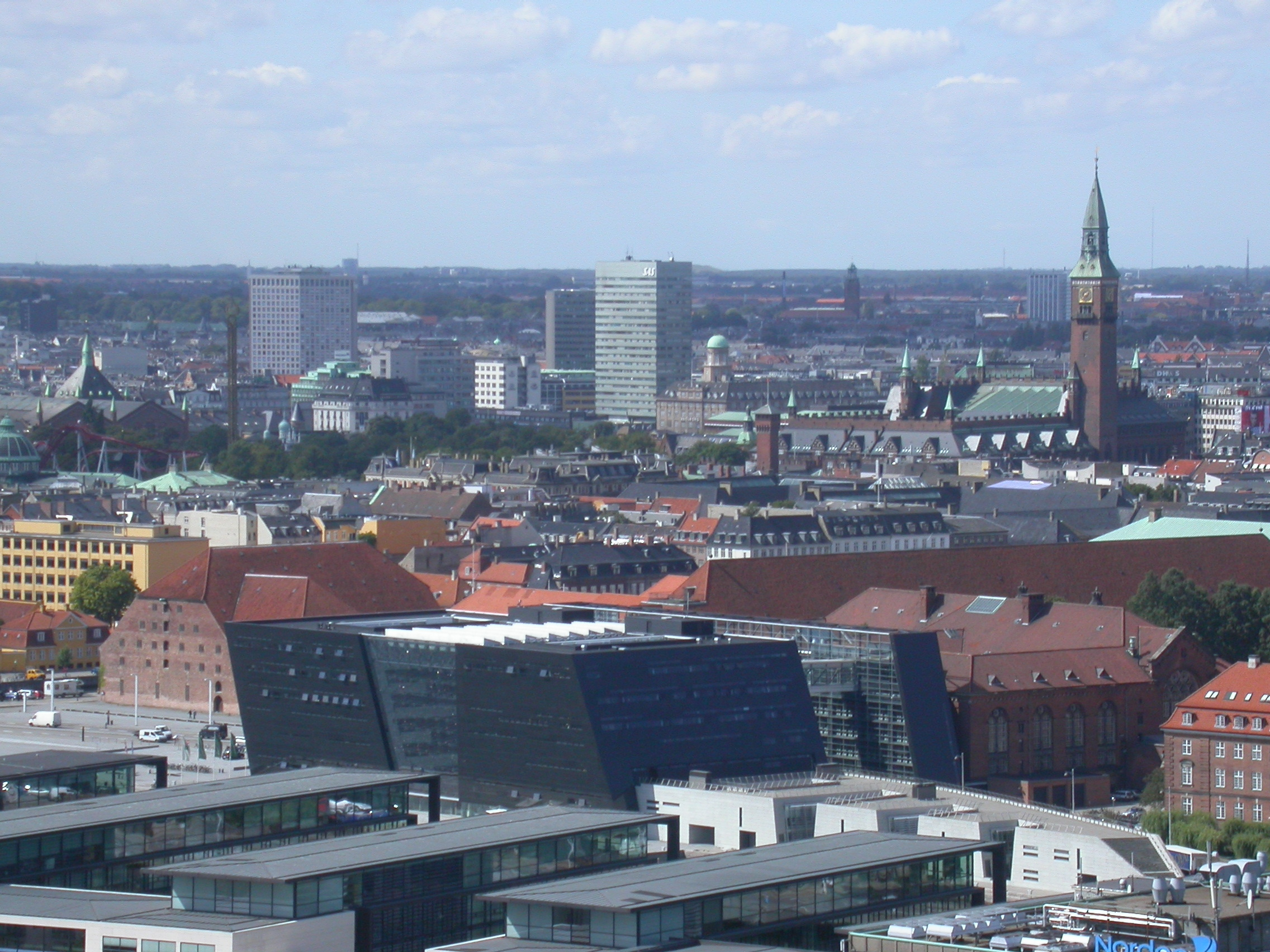 Skyline of Copenhagen